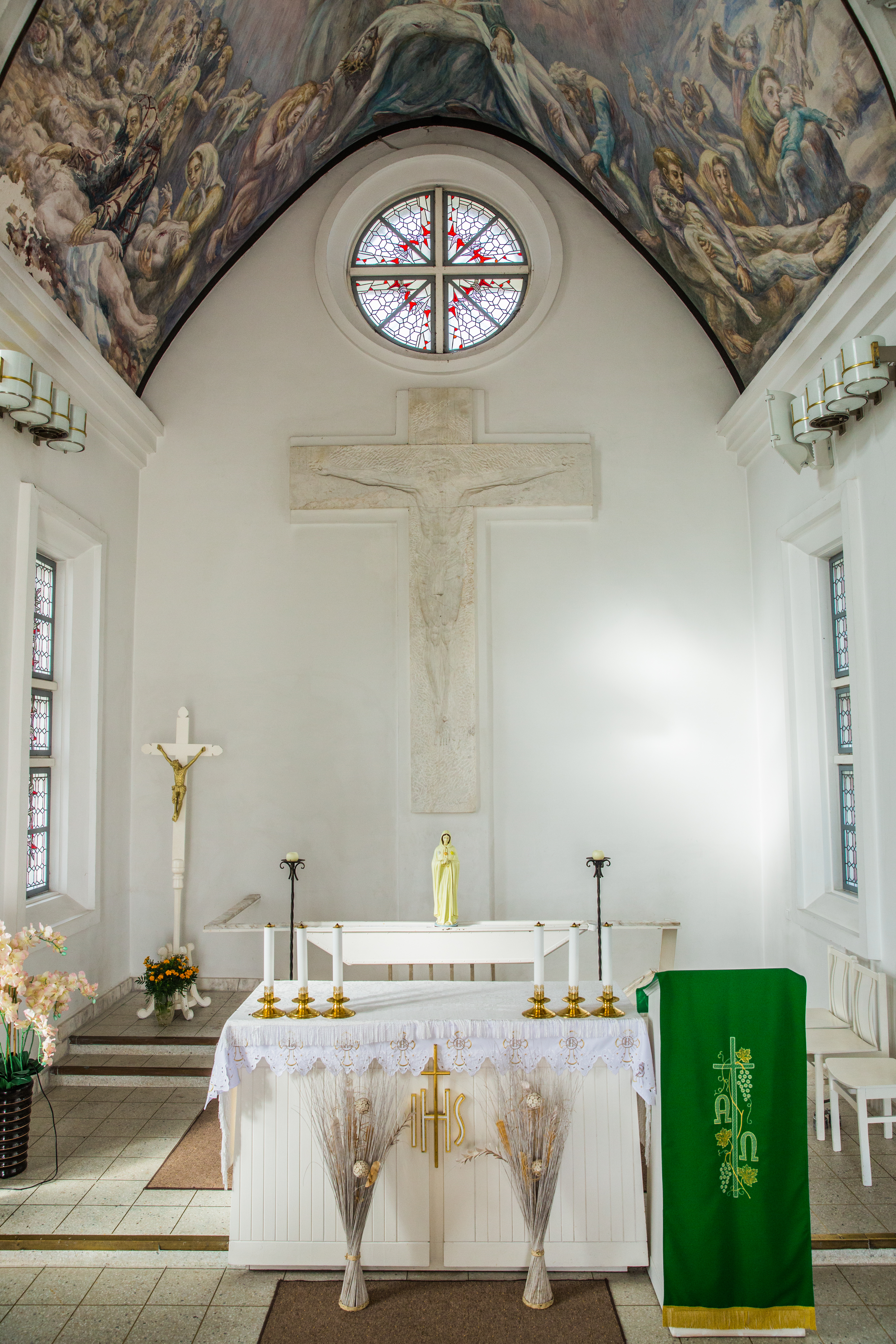 Rainių koplyčios altorius